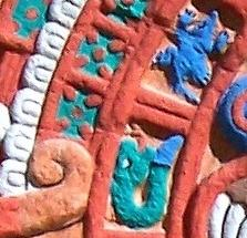 Aztec sun stone replica